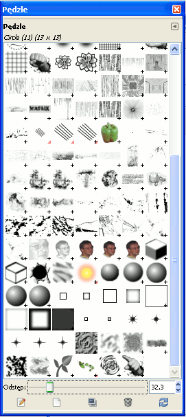 Pędzle w Gimpie